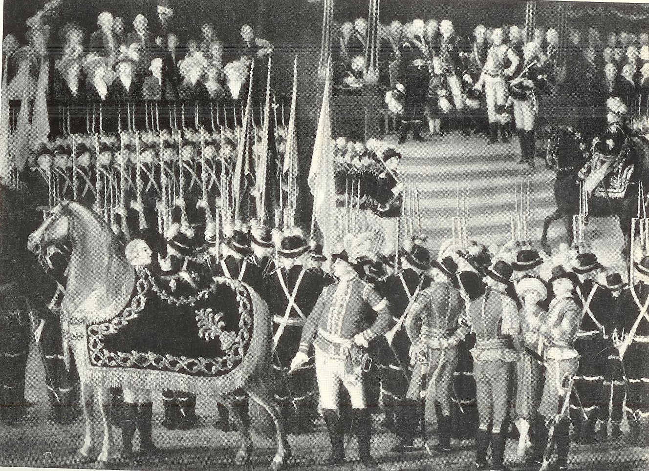 Borgerskapets mönstring av Gustaf III 30/9 1790